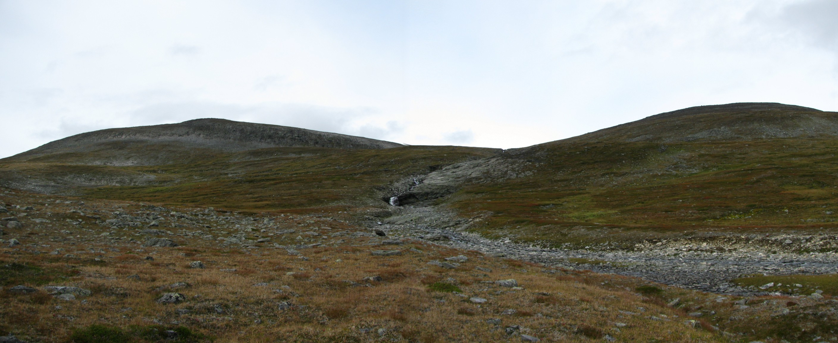 Kiedditsohkka kuvattuna Rihtujohkan varresta tunturien eteläpuolelta, vasemmalla Kiedditsohkka ja oikealla sivuhuippu Etu-Halti